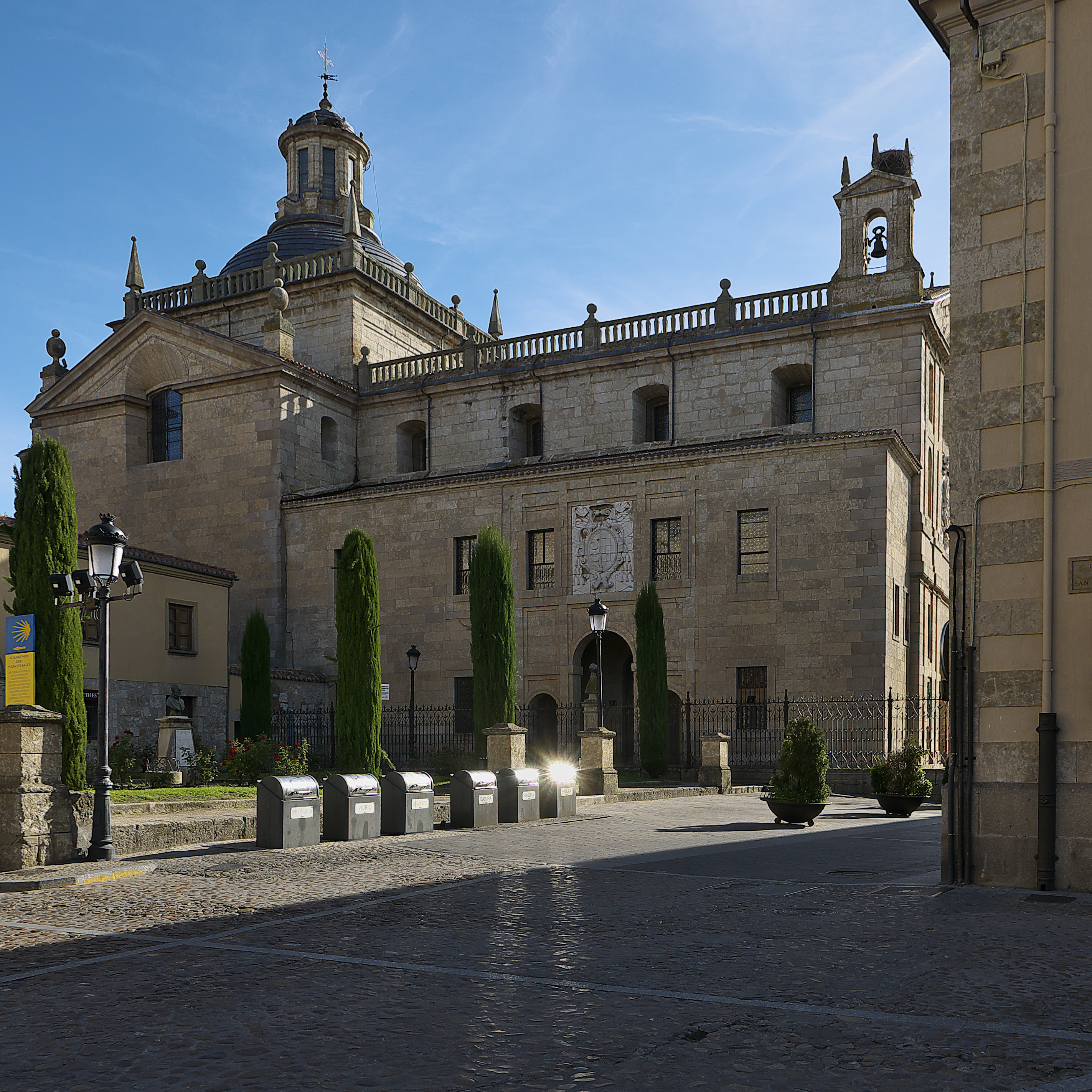 Panteón de Francisco Pacheco de Toledo (†1579). Comenzada hacia 1585, posiblemente con trazas de Juan de Valencia y la colaboración de Juan Ribero de Rada